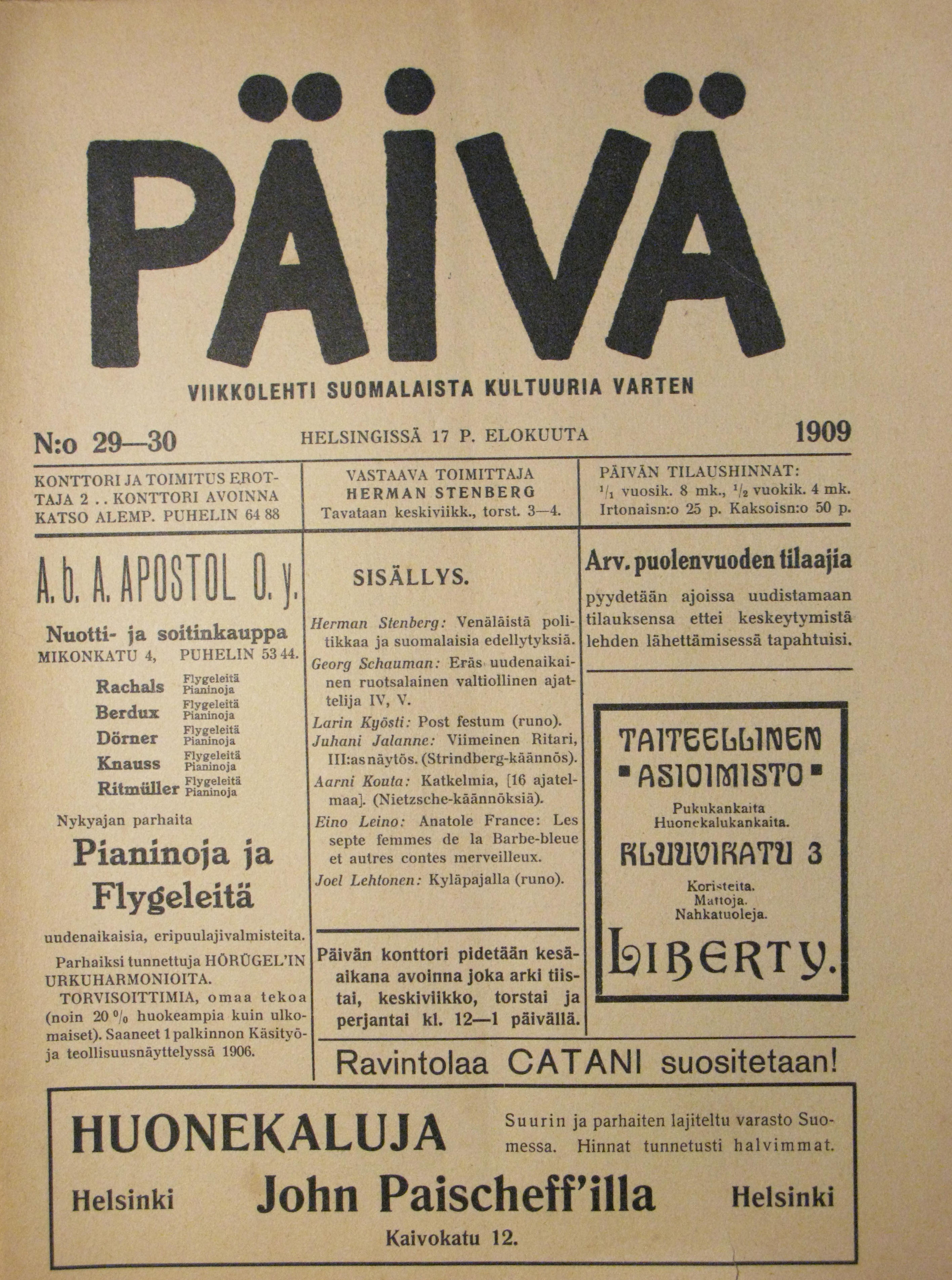 Päivä. Helsingissä vuosina 1907-1911 ilmestynyt kulttuurilehti.